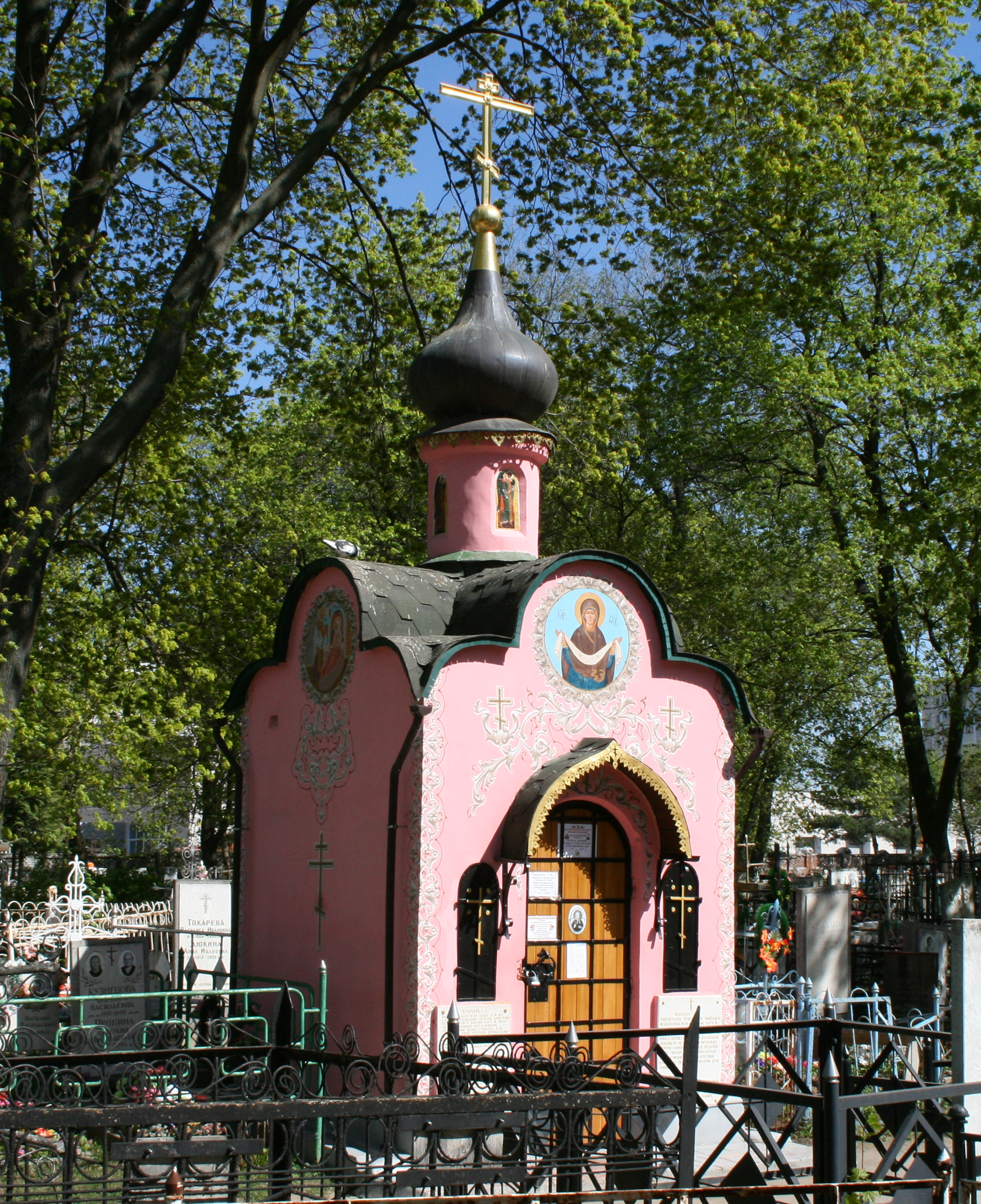 Часовня блаженной Любови Рязанской на Скорбященском кладбище Рязани